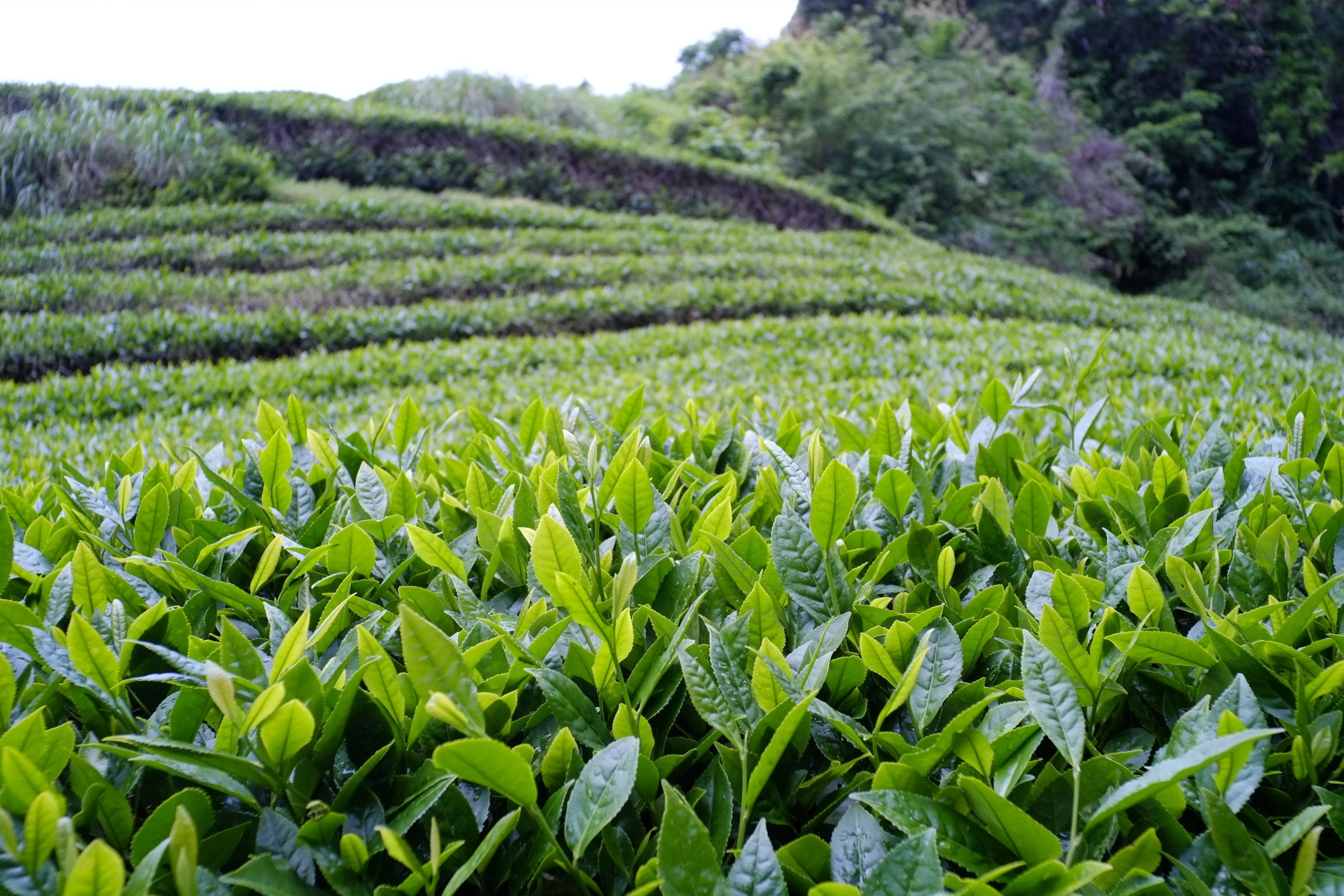 現在の丸子紅茶（べにふうき）の原木が最初に植えられた茶畑。 植えられてから10年ほどたちます。